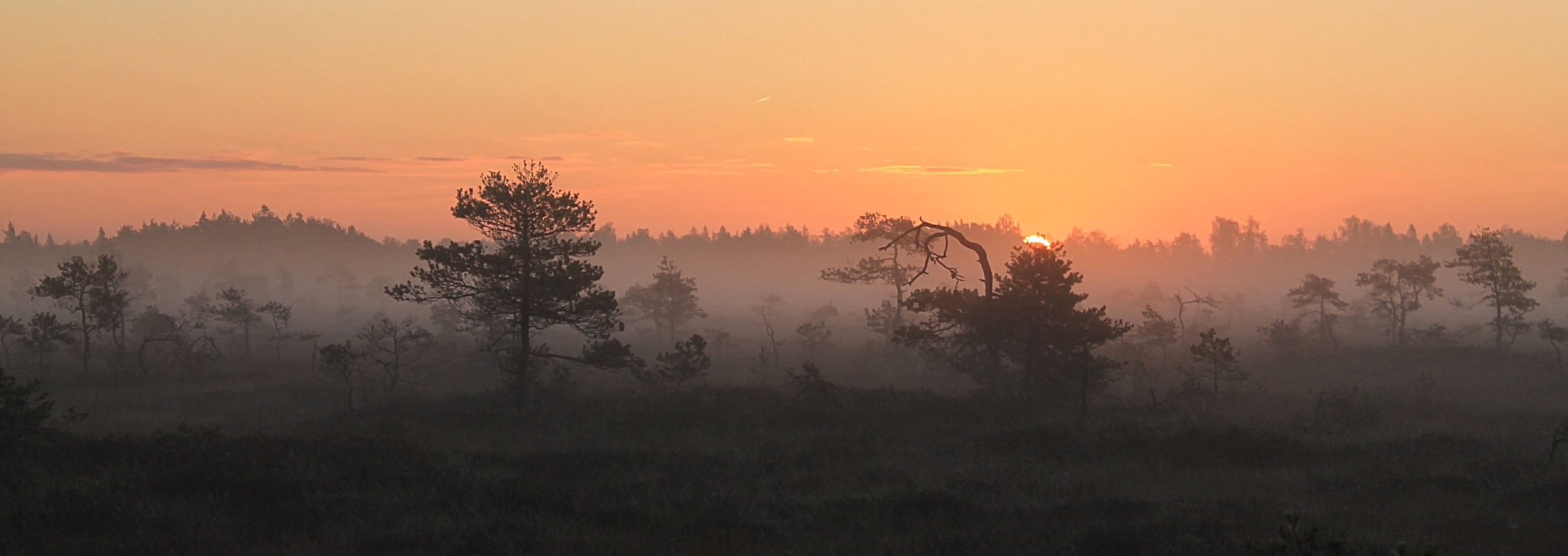 Varahommikune retk päikesetõusuga tootmisturbarabas